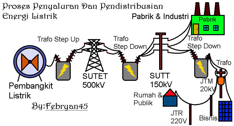 Karya Ini Adalah Karya Saya Karena Saya Menggambarnya Sendiri.